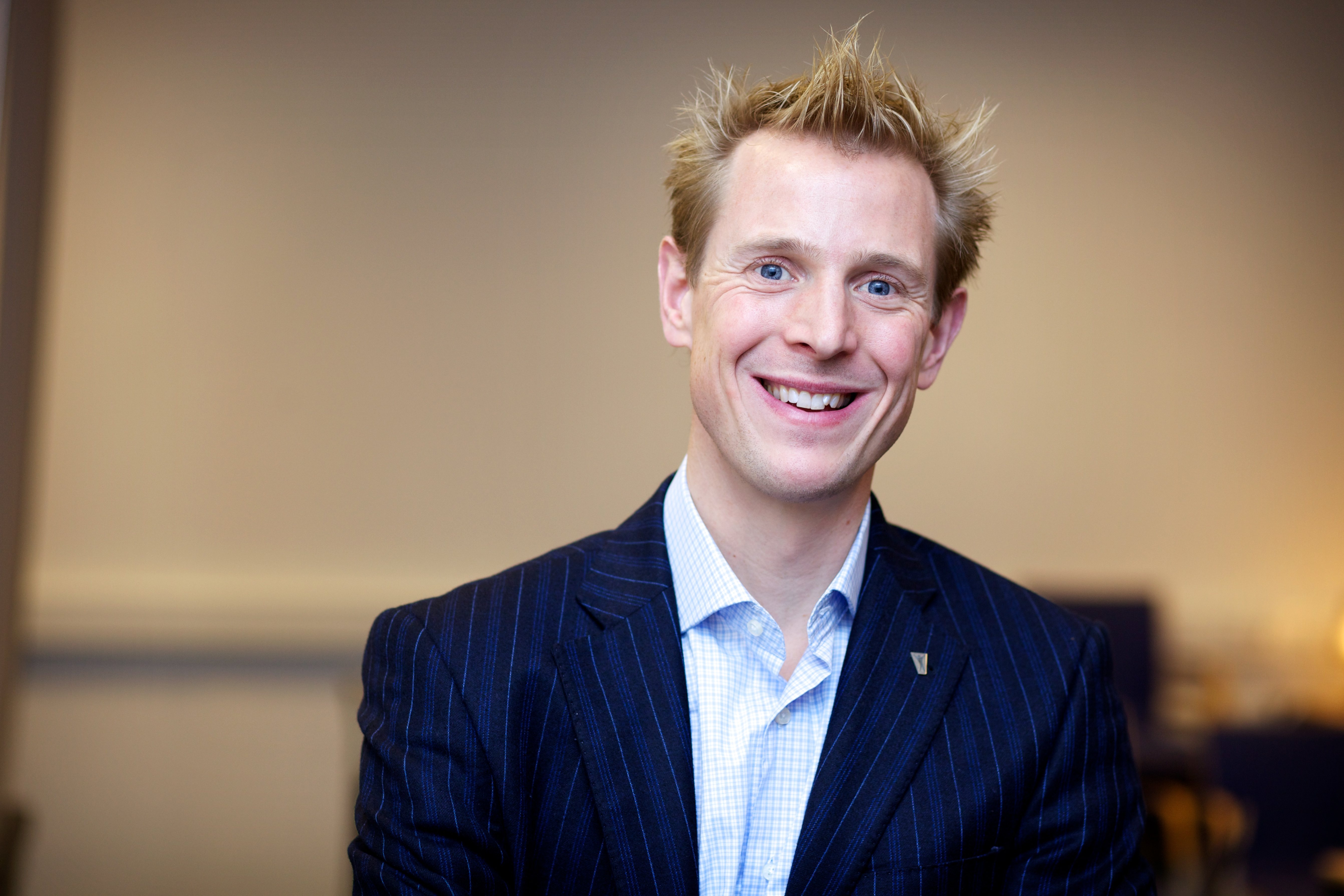 Echt Overvecht heeft tot doel om een positiever licht op deze mooie wijk te laten schijnen. Verschillende partners werken samen aan het imago van Overvecht. Tijdens de partnerbijeenkomst van werd vooruit gekeken naar het komend jaar. Ligt Echt Overvecht op koers en waar kan de samenwerking intensiever? Voormalig schaatser en Olympisch kampioen Jochem Uytdehaage nam de aanwezigen mee op de weg naar resultaten, presteren en teambuilding.